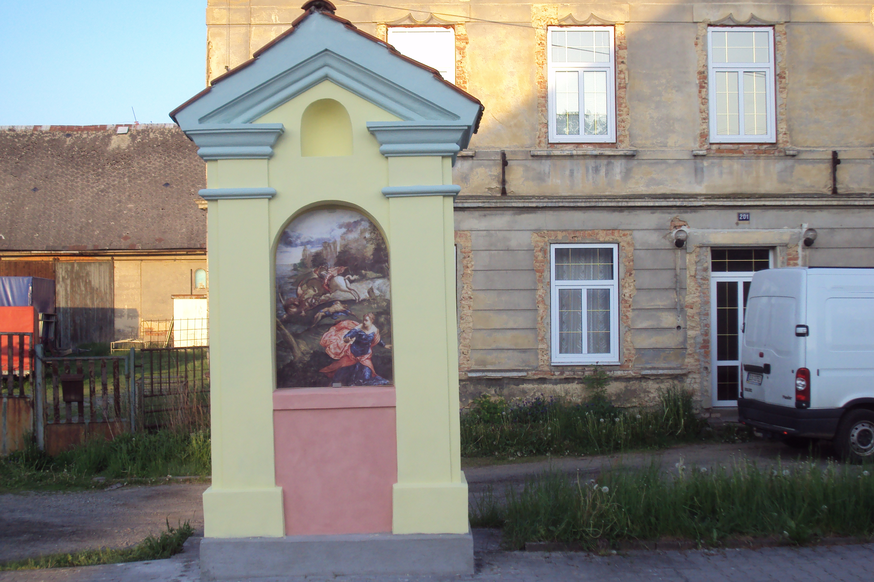 Zrenovovaná kaplička v Zákupech, pohled z ulice